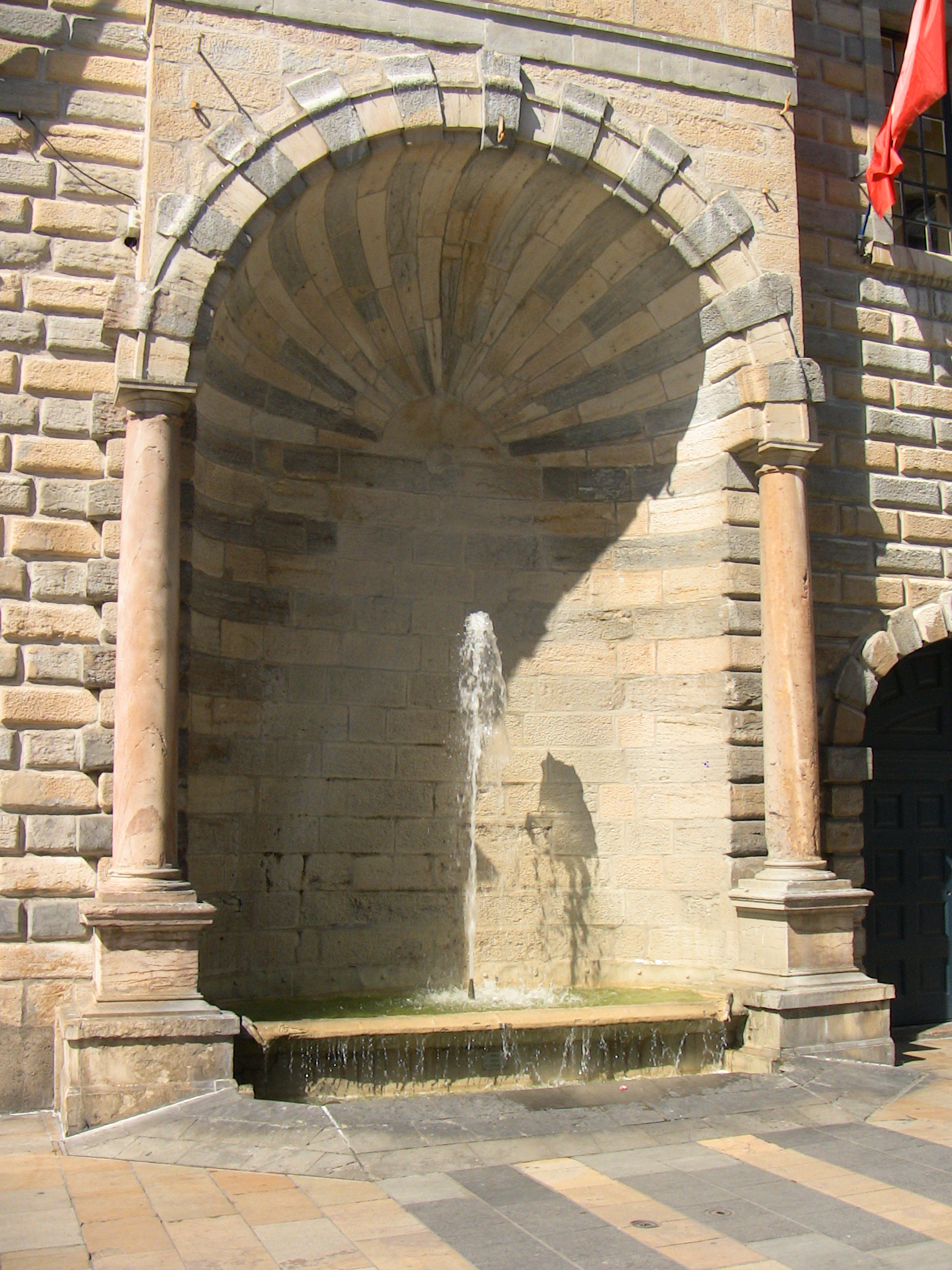 Fontaine Charles-Quint, à l'Hôtel de Ville de Besançon.